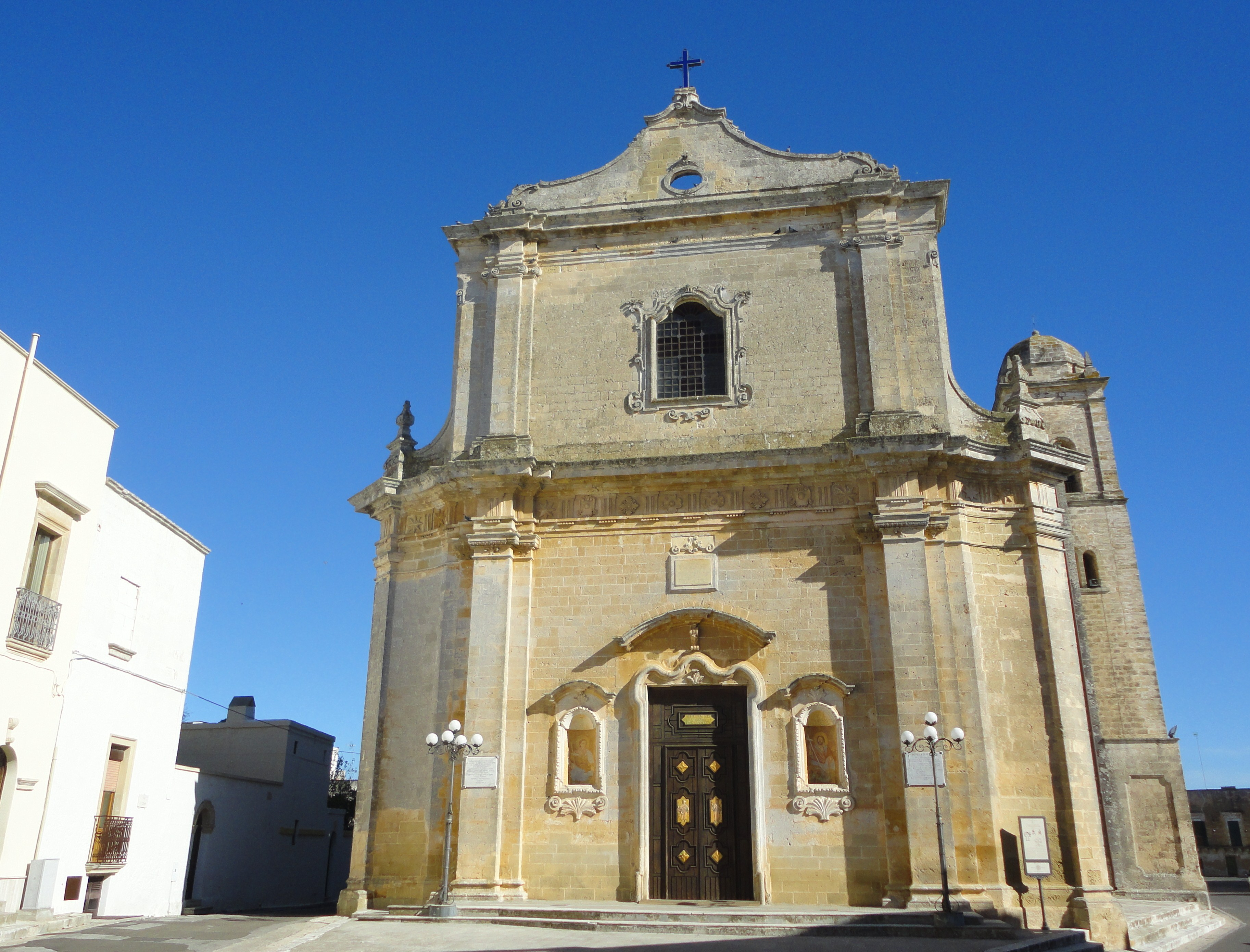 Chiesa San Filippo e Giacomo Diso, Lecce